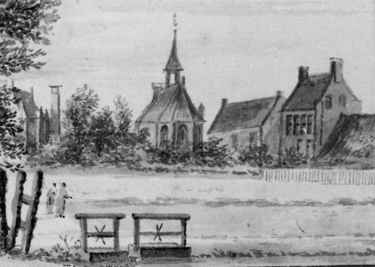 Gezicht op de Monnikendam te Amersfoort, met rechts op de achtergrond het Burgerweeshuis (voormalig klooster Mariënhof)